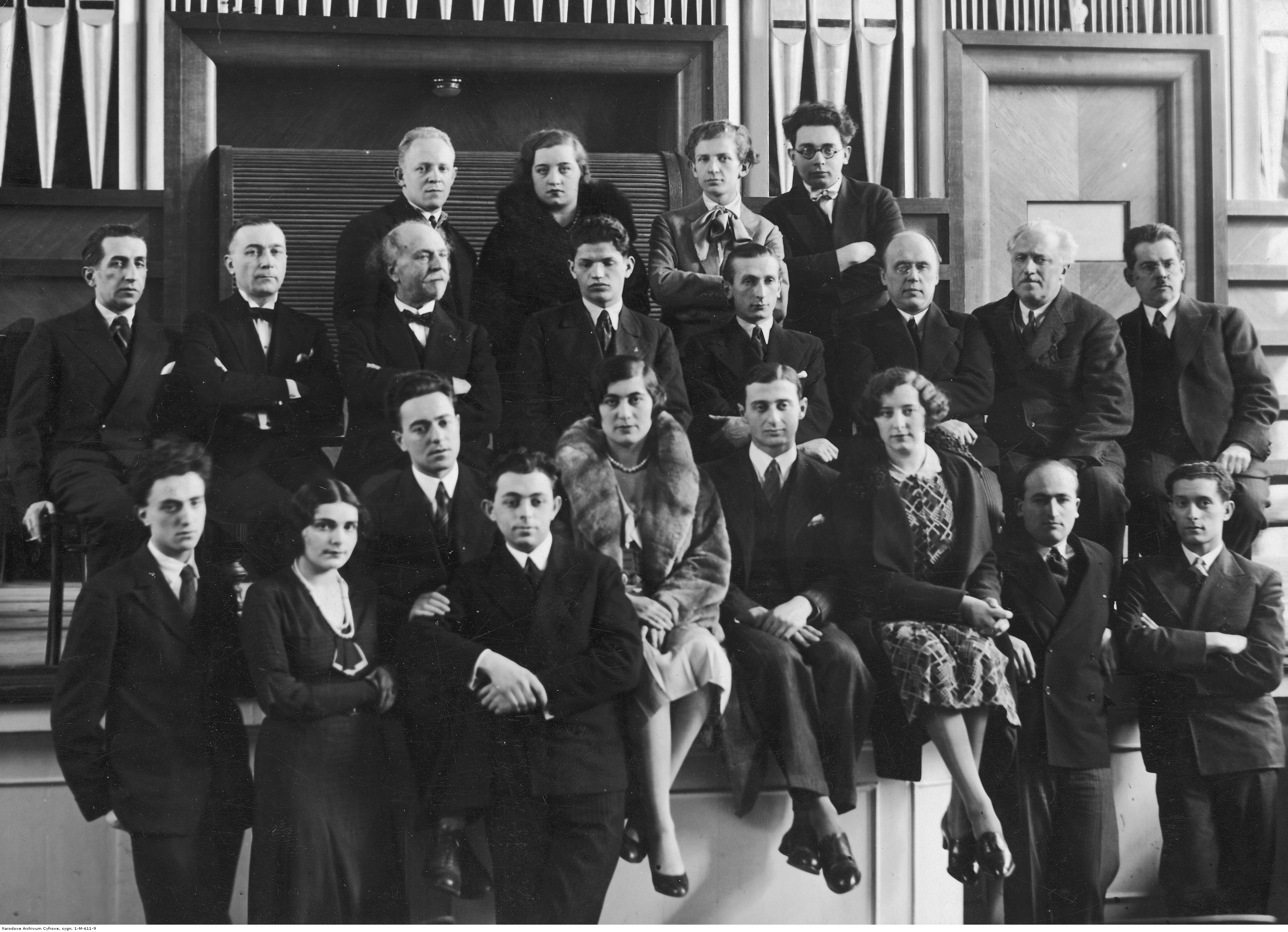 2nd Chopin Competition laureates and jurors. First row, among others: (beginning from the 2nd person): Emanuel Grossman (USSR), Olga Iliwicka (Poland), Teodor Guttman, Leonid Sagałow, Lily Herz (Hungary), Leon Boruński, Lajos Kentner (Hungary), Kurt Engel (Austria); 2nd row (from left): rector Zbigniew Drzewiecki, Prof. Józef Śmidowicz, Prof. Arthur De Greef,Imre Ungar (Hungary), Alexandre Uninsky, Prof. Jerzy Żurawlew, Prof. Marian Dąbrowski, juror Chromiński; 3rd row: Abram Lufer, Maryla Jonas, Gyula Karolyi, Josef Wagner.